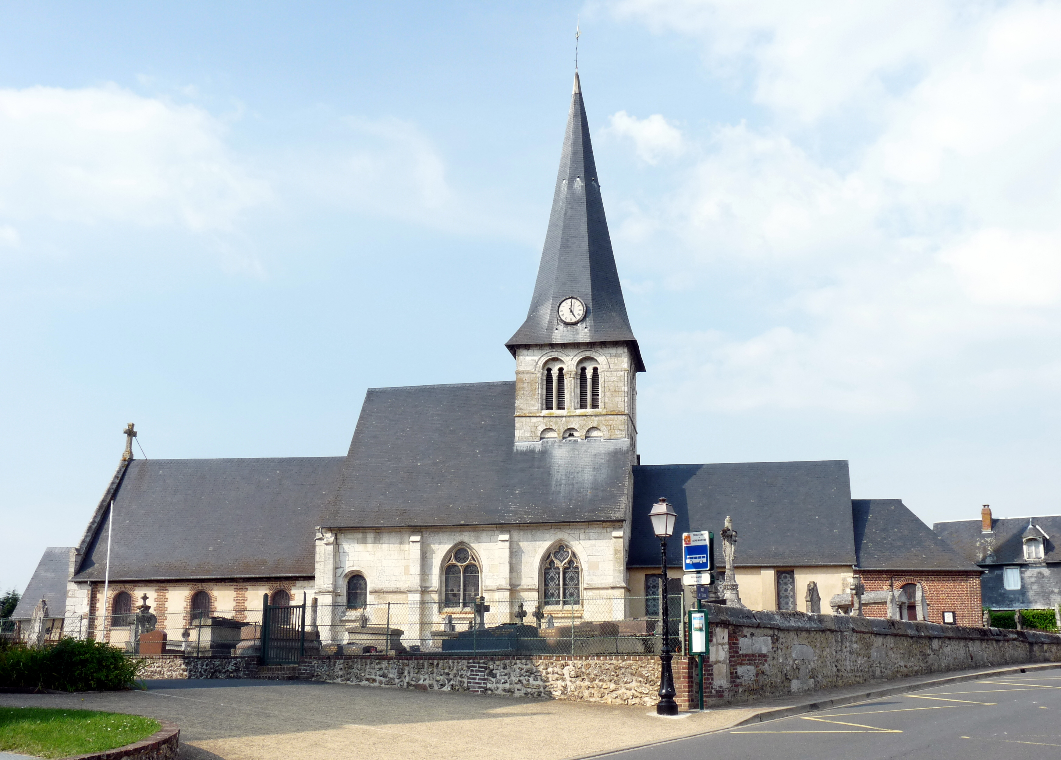 Église Notre-Dame de Roumare (Classé) .